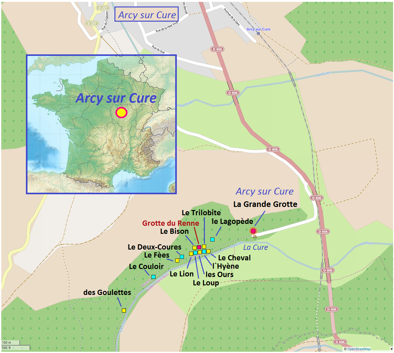 Lage der Grotten von Arcy-sur-Cure (Frankreich)